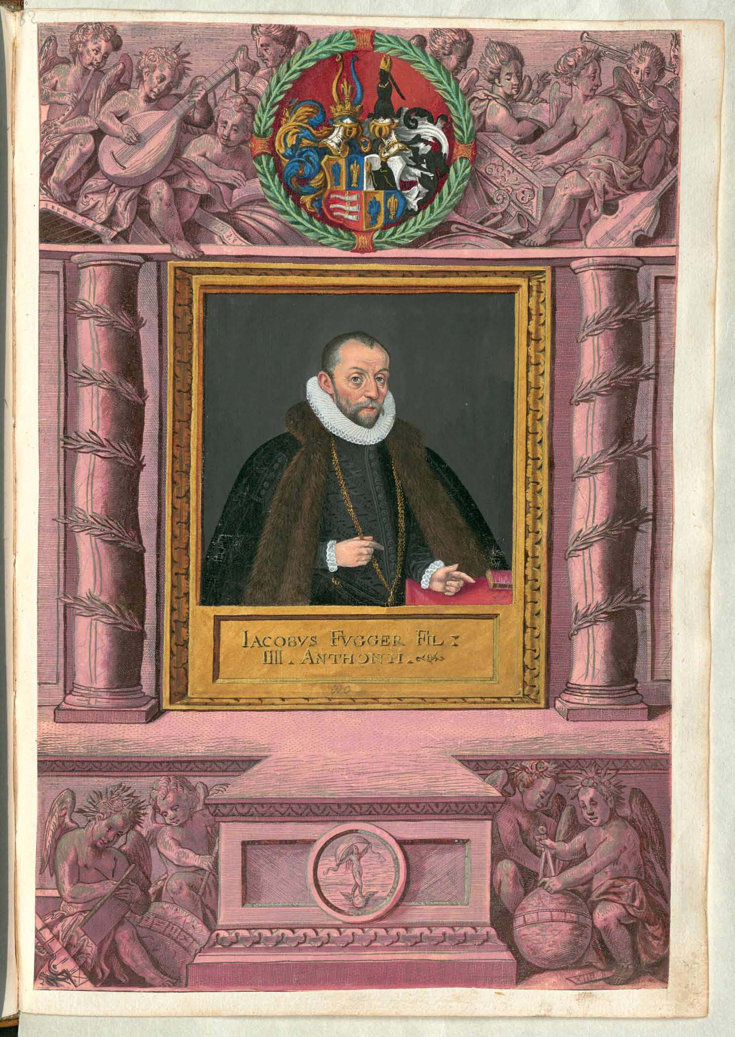 Fuggerorum et Fuggerarum imagines wurde 1588 von Philipp Eduard Fugger beim Kupferstecher Dominicus Custos in Auftrag gegeben. Das Werk enthält mit Aquarell- und Gouache-Farbe kolorierte Stiche der Mitglieder der Fugger von der Lilie. Der Druck von 1618 stellt das einzige kolorierte Exemplar dar.